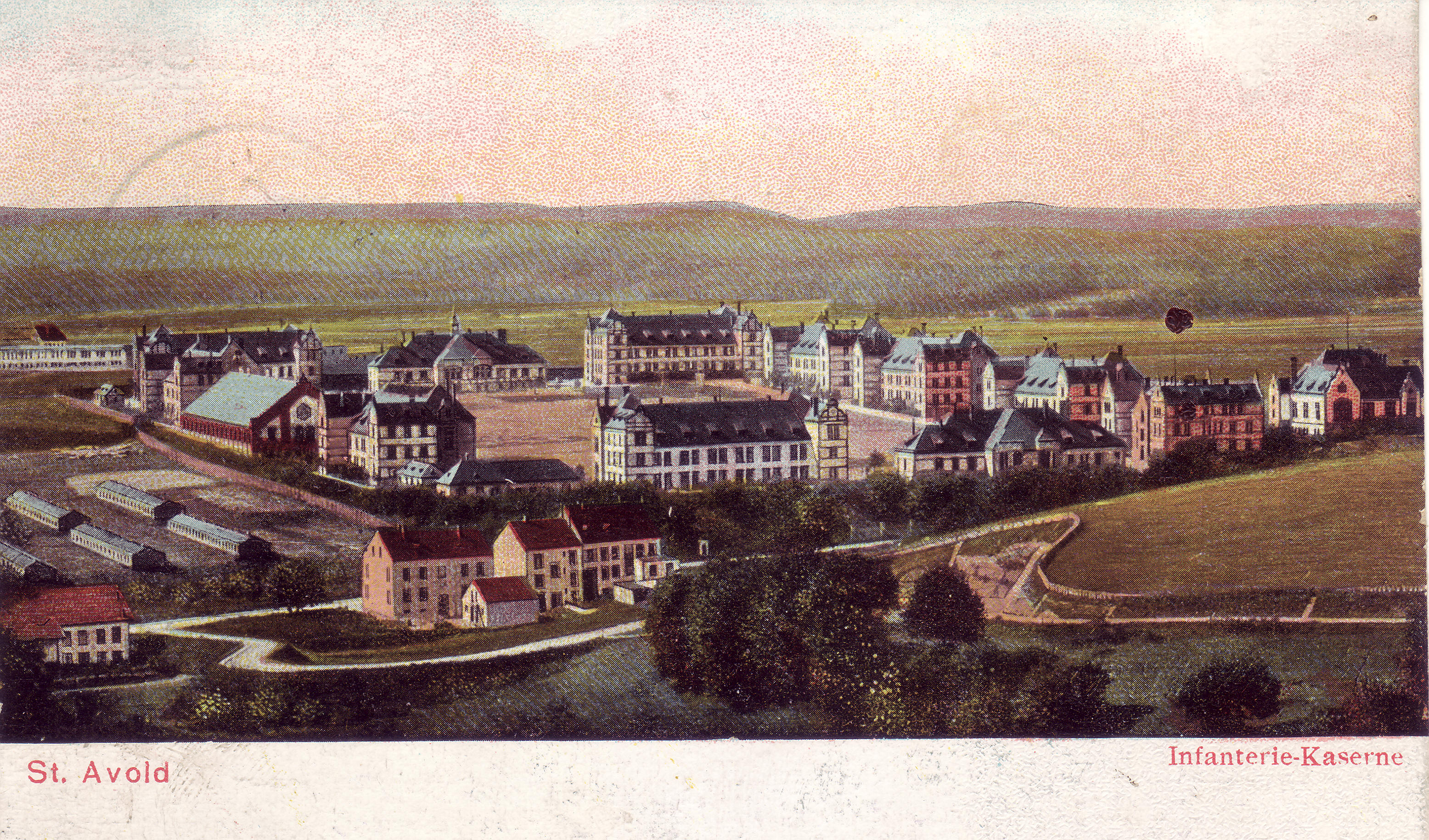 Vue d'ensemble de la caserne Ardent du Picq (Infanterie Kaserne) à St Avold (Moselle, France) avant 1918